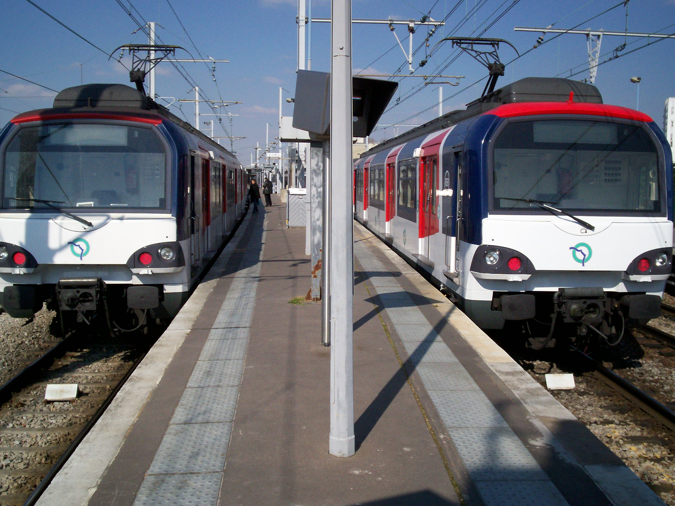 2 rames MS 61 rénovées à Boissy